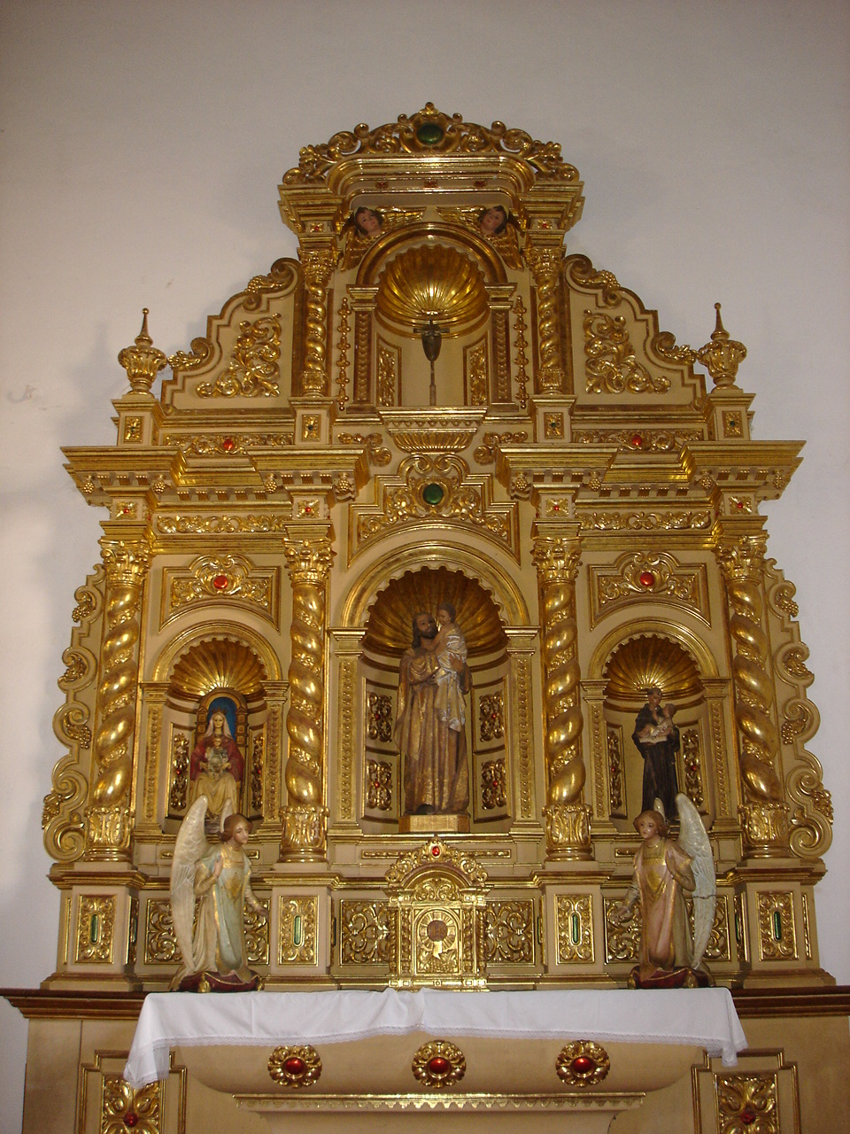 Altar en la Catedral de Coro (Estado Falcón, Venezuela)